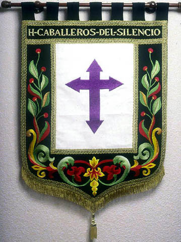 Repostero de la Hermandad de Caballeros del Silencio, Astorga (León, España).